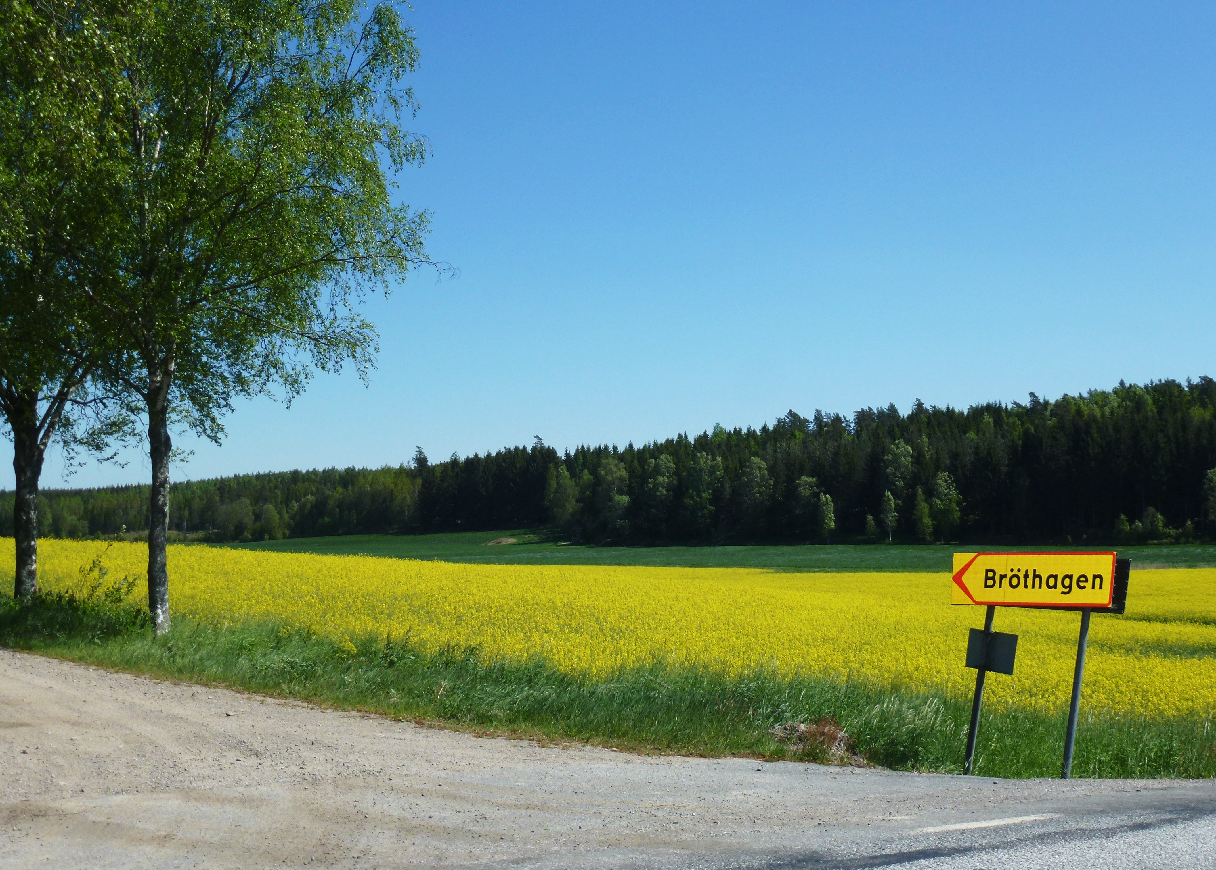 Bröta och Bröthagen i Grödinge socken